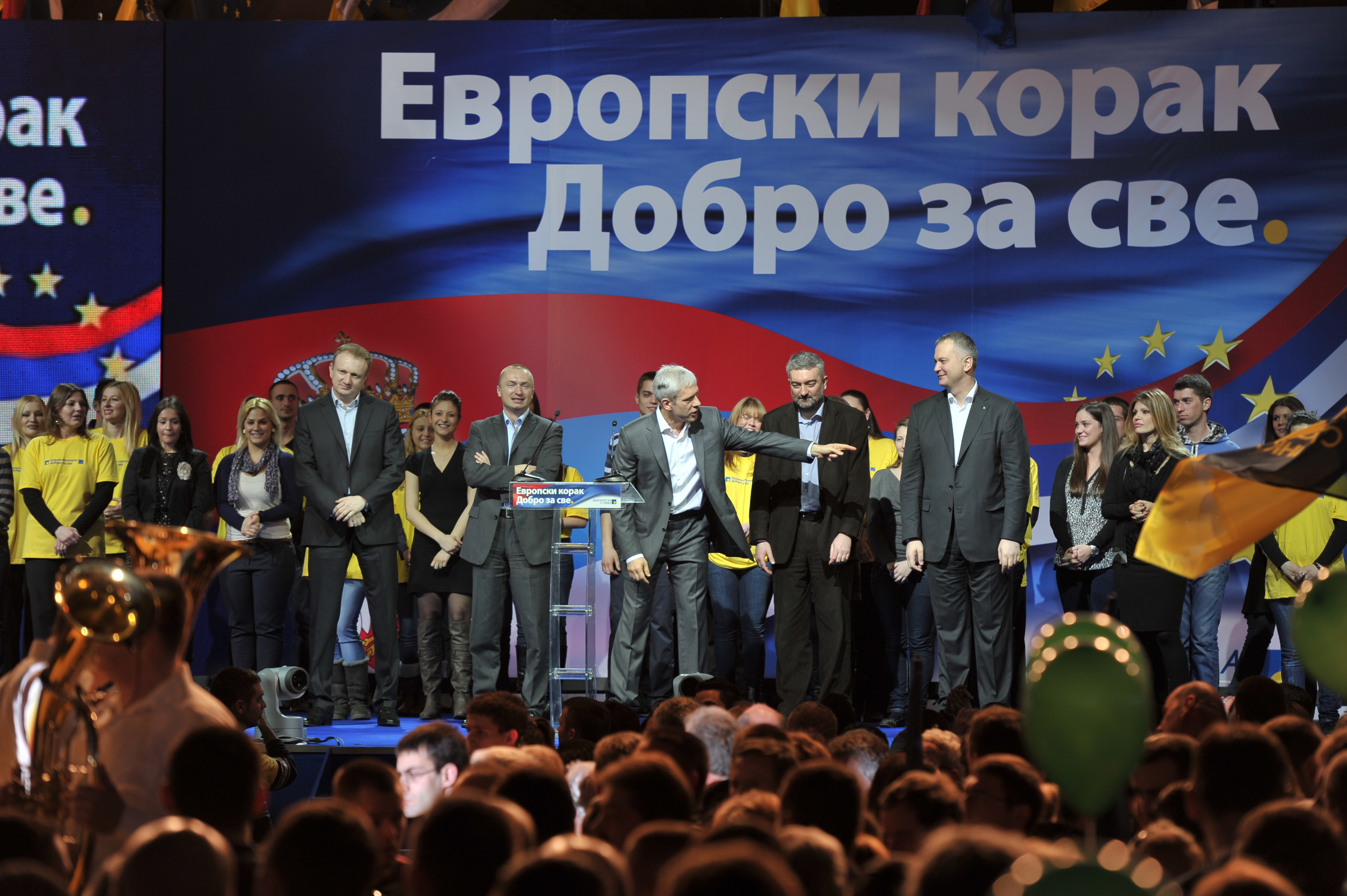 Evropski korak – dobro za sve, skup demokrata posvećen dobijanju statusa kandidata za članstvo Srbije u Evropskoj uniji; Beograd, 3. mart 2012; Foto servis DS; (za više informacija posetite